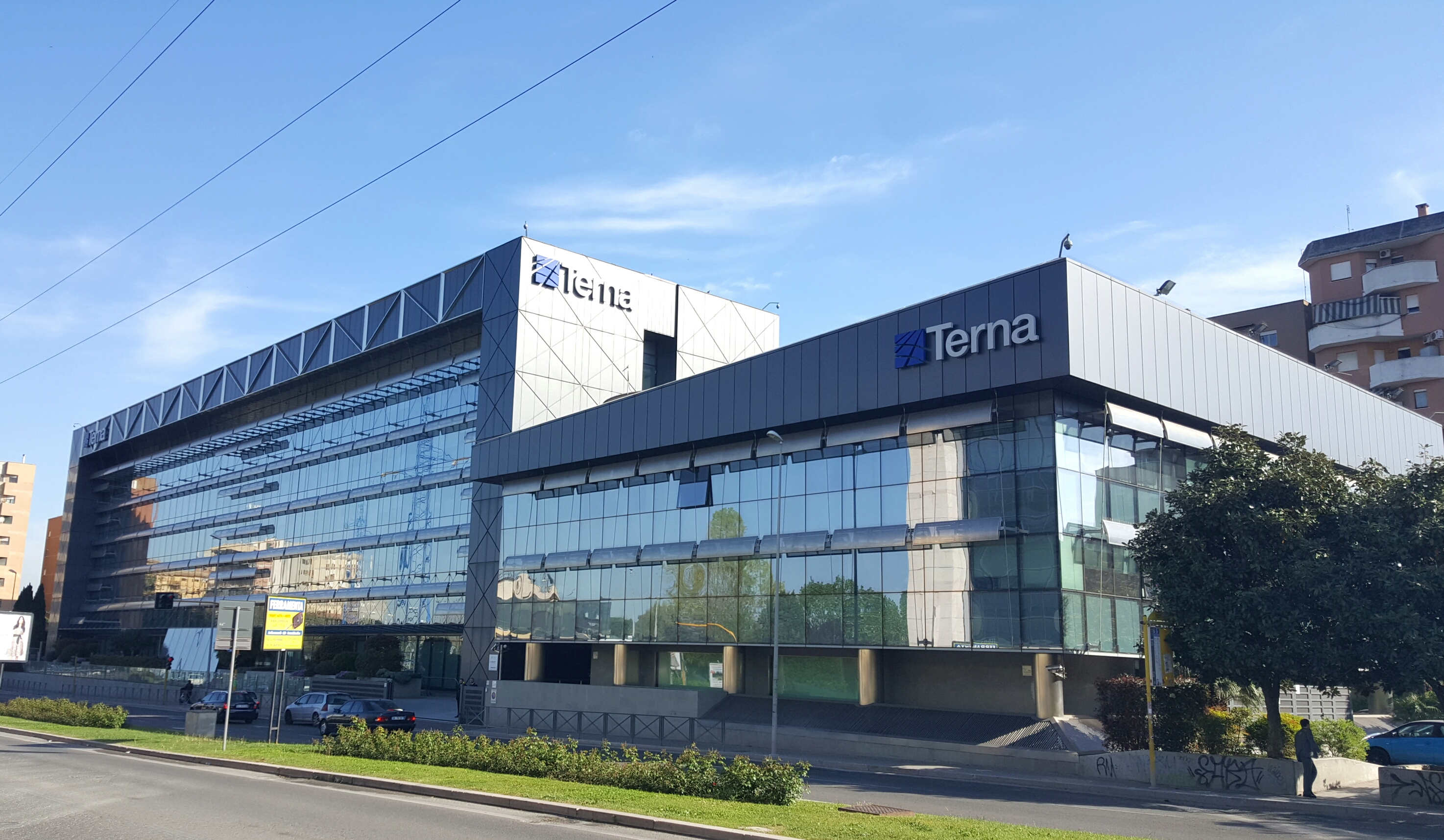 Sede principale di Terna SpA a Roma, via Galbani, 70